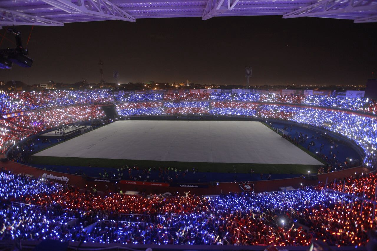 Inauguracion Nueva Olla azulgrana 45.000 espectadores